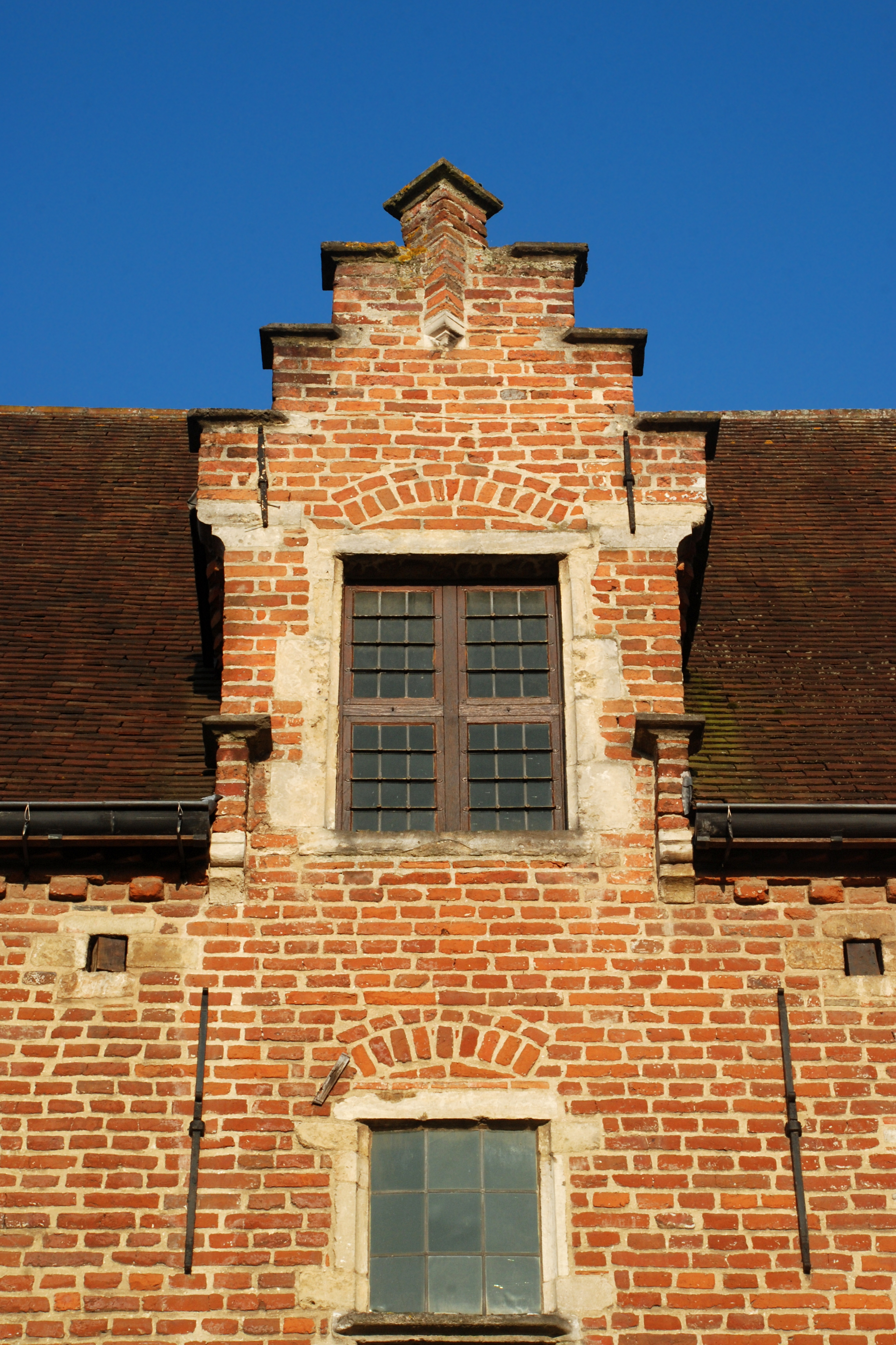 Belgium - Leuven - Groot Begijnhof - Middenstraat n° 14-15 - Faculty club